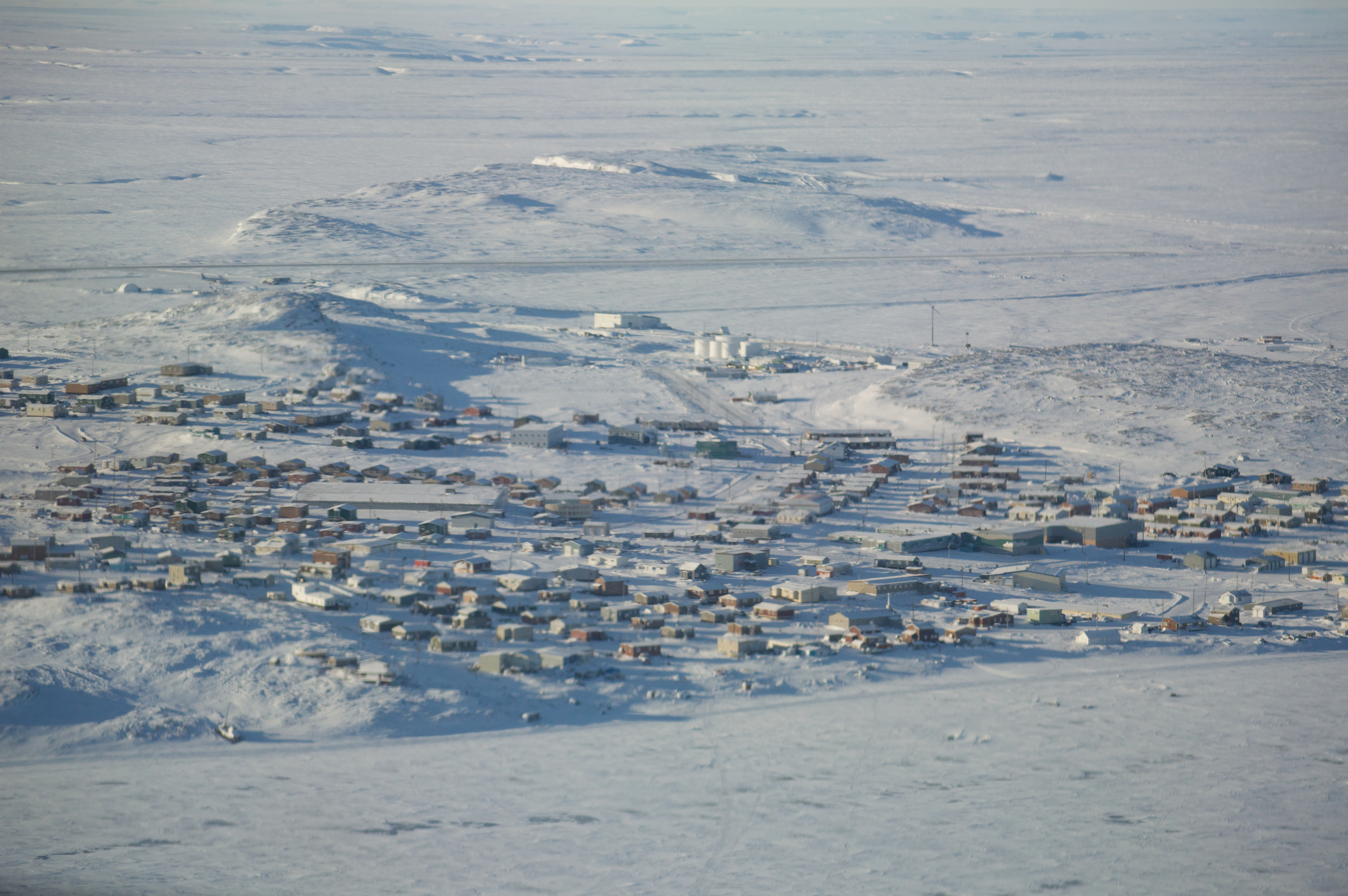 Kugluktuk, Nunavut